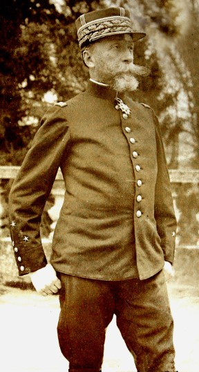 cadrage serré de la photographie du Général prise le10 avril 1915, collection de la famille